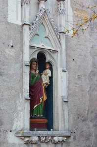 Statue der wundertätigen Maria (Marienstandbild) - Wallfahrtskirche St. Marien (Küblingen)